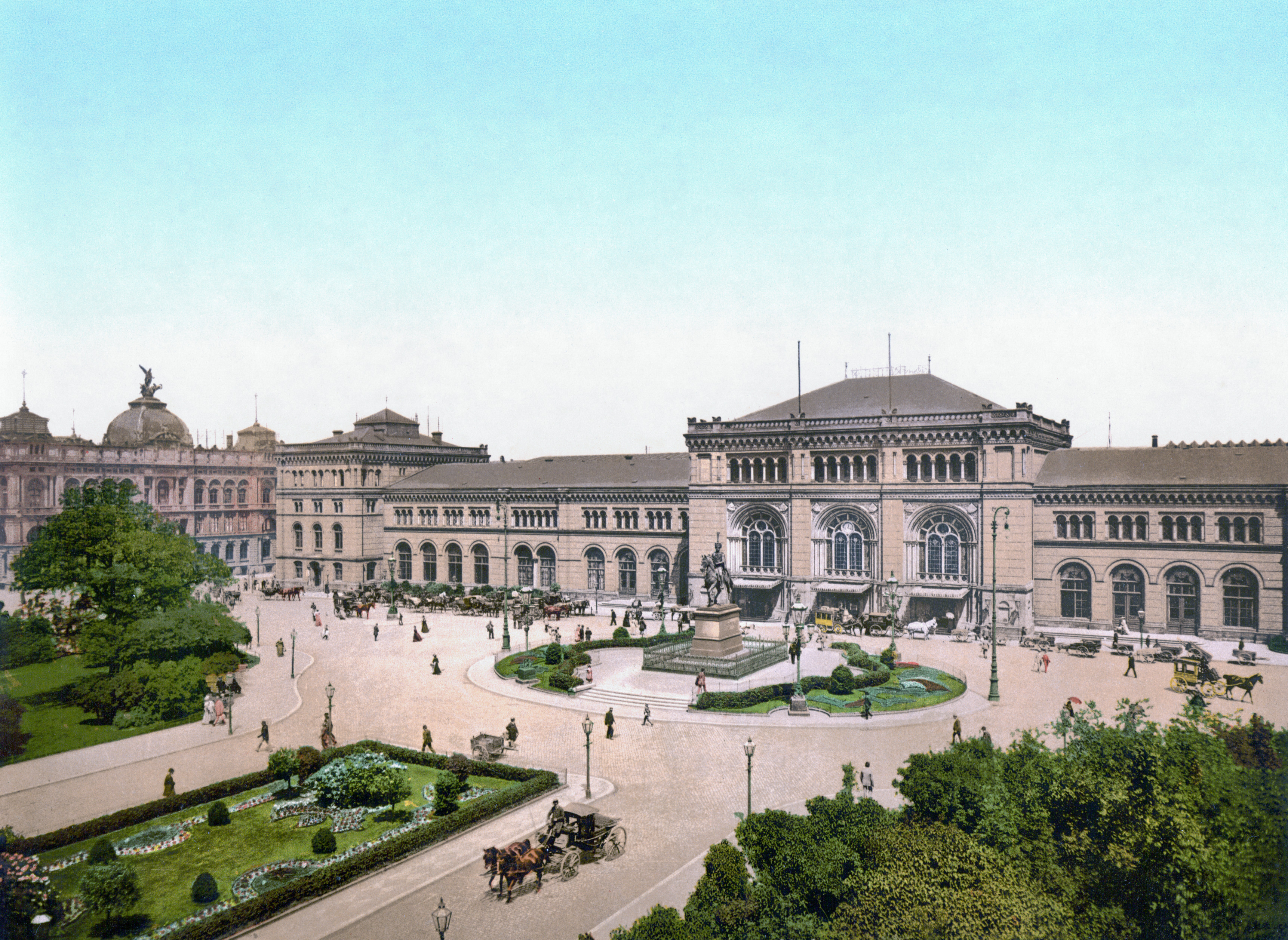 Der Ernst-August-Platz in Hannover um 1900. Neben dem Hauptbahnhof ist links das von 1878 bis 1881 nach Plänen von Kind und Böttger gebaute Kaiserliche Post- und Telegraphenamt zu sehen. Das Gebäude mit der markanten Kuppel wurde 1943 bei den Luftangriffen auf Hannover zerstört und 1950/51 durch einen Neubau ersetzt. Dieser wurde 2006 für das Einkaufszentrum Ernst-August-Galerie abgerissen.